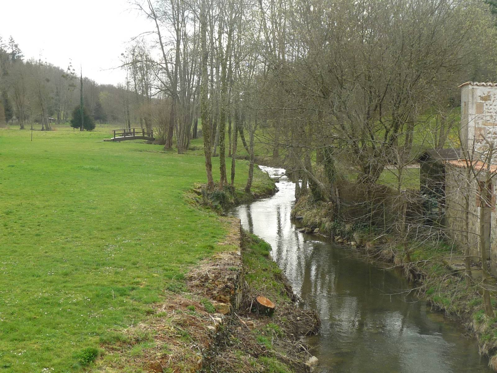 le Rivaillon, ruisseau de Vitrac-St-Vincent, Charente, France